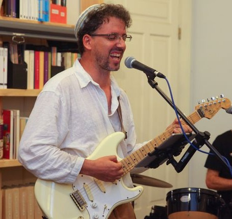 אביאור ביירון בהשקת האלבום "שירים לציפורה", במכללת עלמא, תל אביב